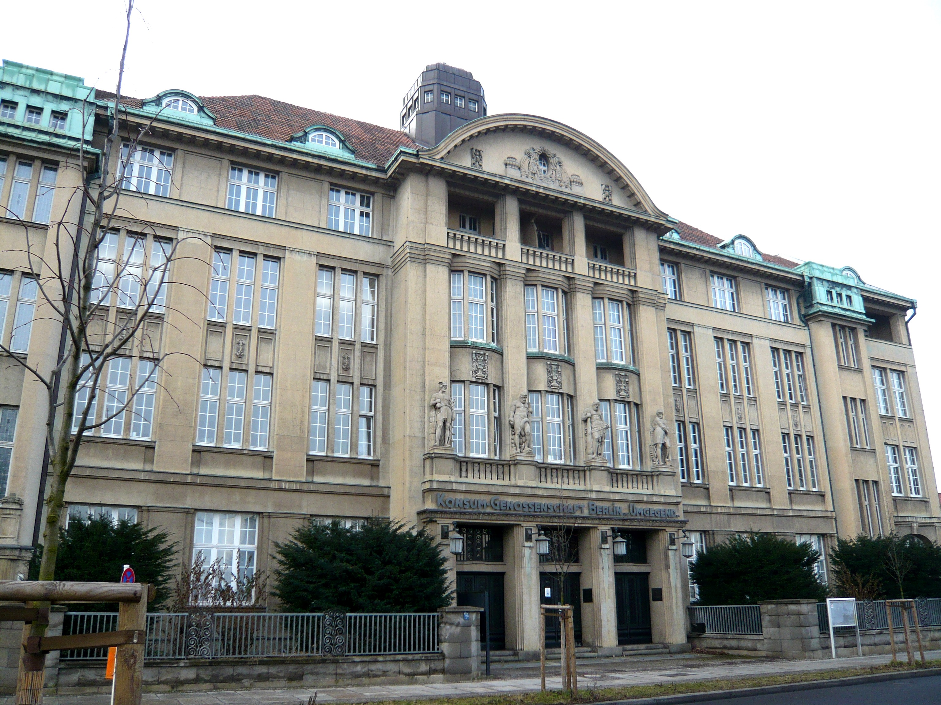 Verwaltungsgebäude der Konsumgenossenschaft für Berlin und Umgegend (Konsum Berlin) in Berlin-Lichtenberg, Josef-Orlopp-Straße 34/36, Straßenseite; erbaut 1913-1914; unter Denkmalschutz